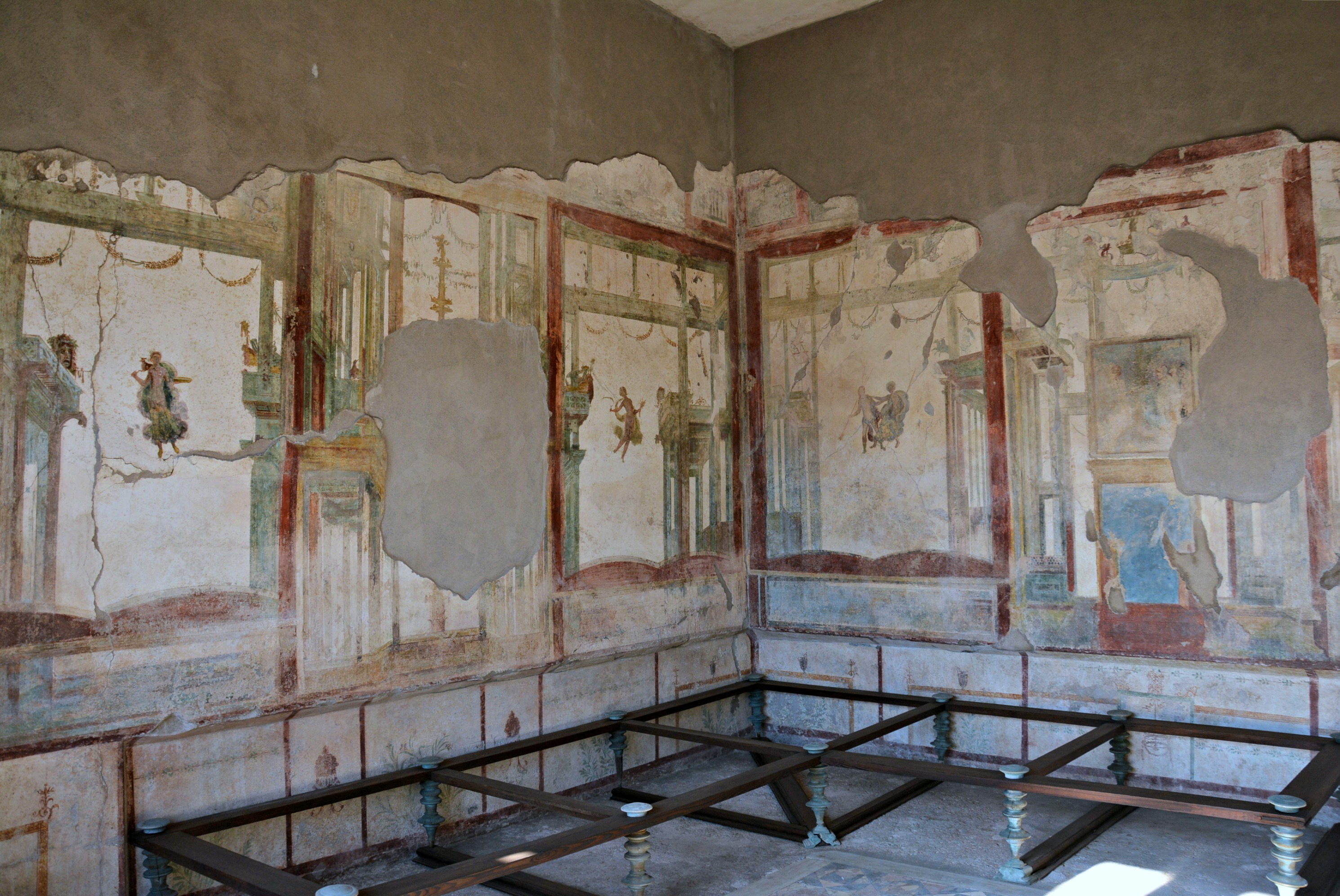 Vedi titolo